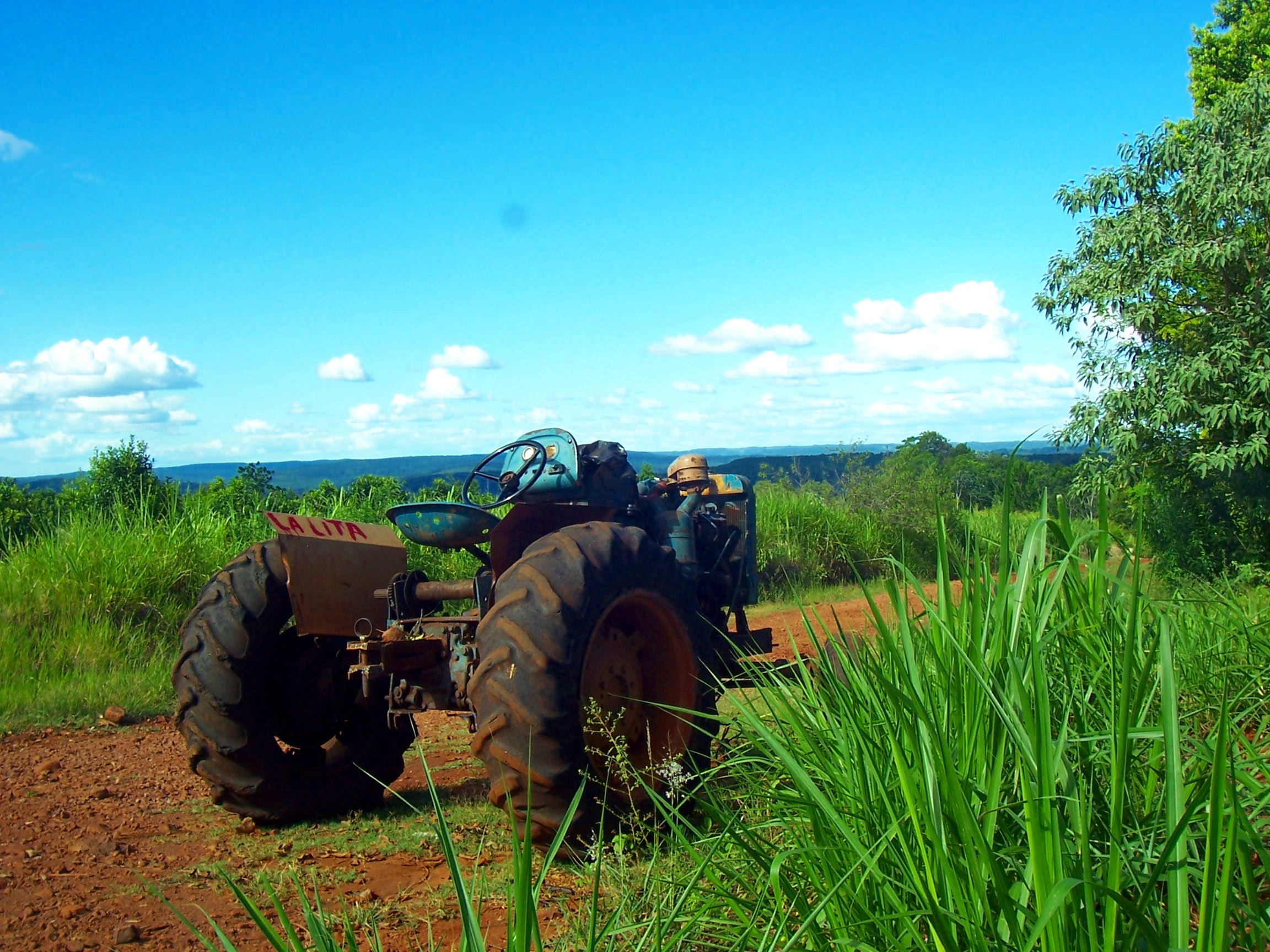 Área rural de Colonia Alberdi, provincia de Misiones.